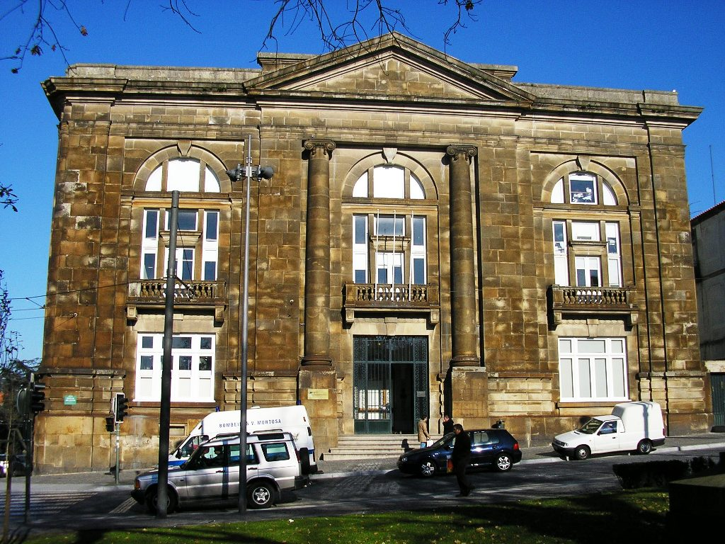 "Abel Salazar" medical school in Porto, Portugal.